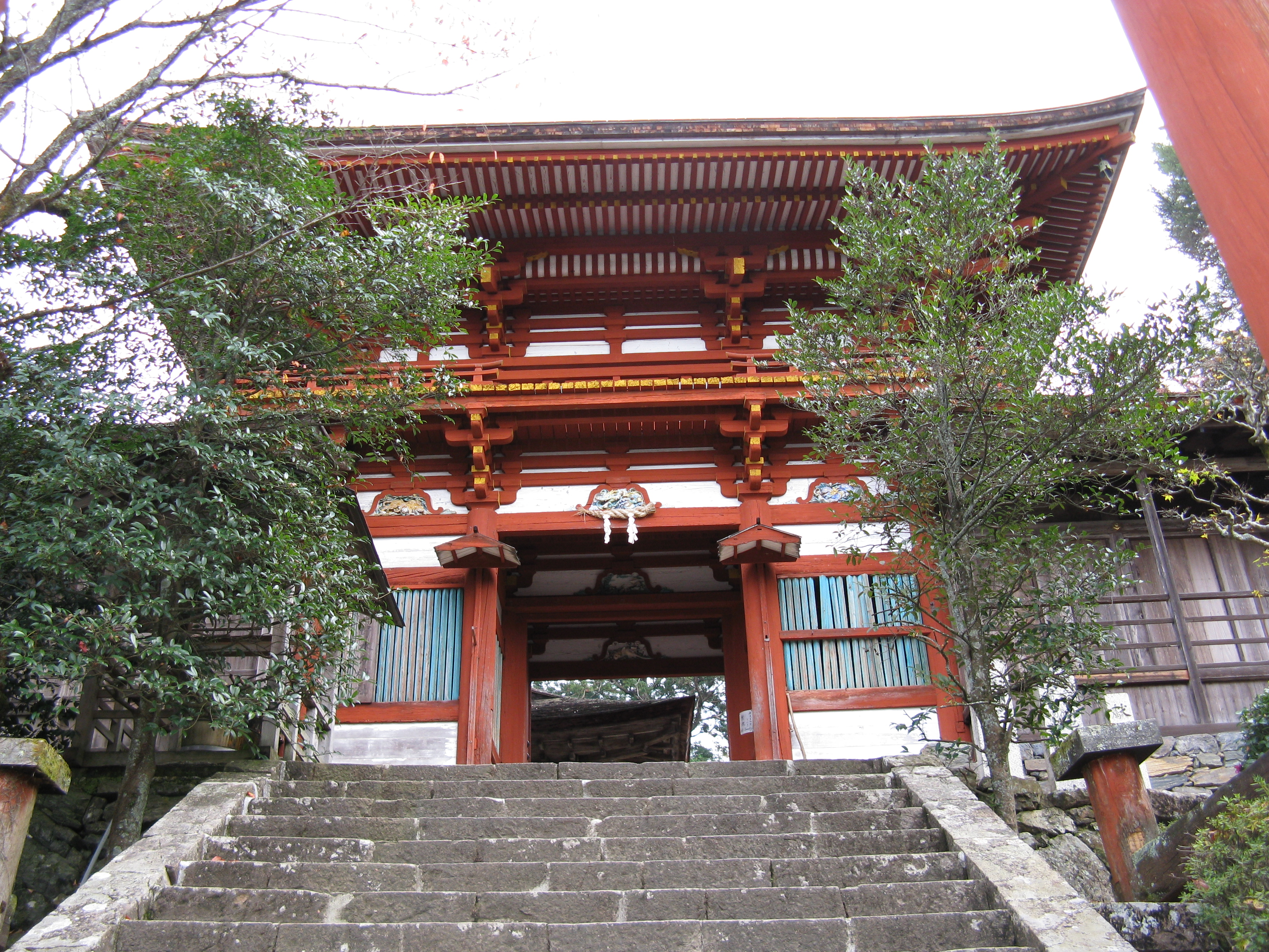 吉野水分神社 楼門